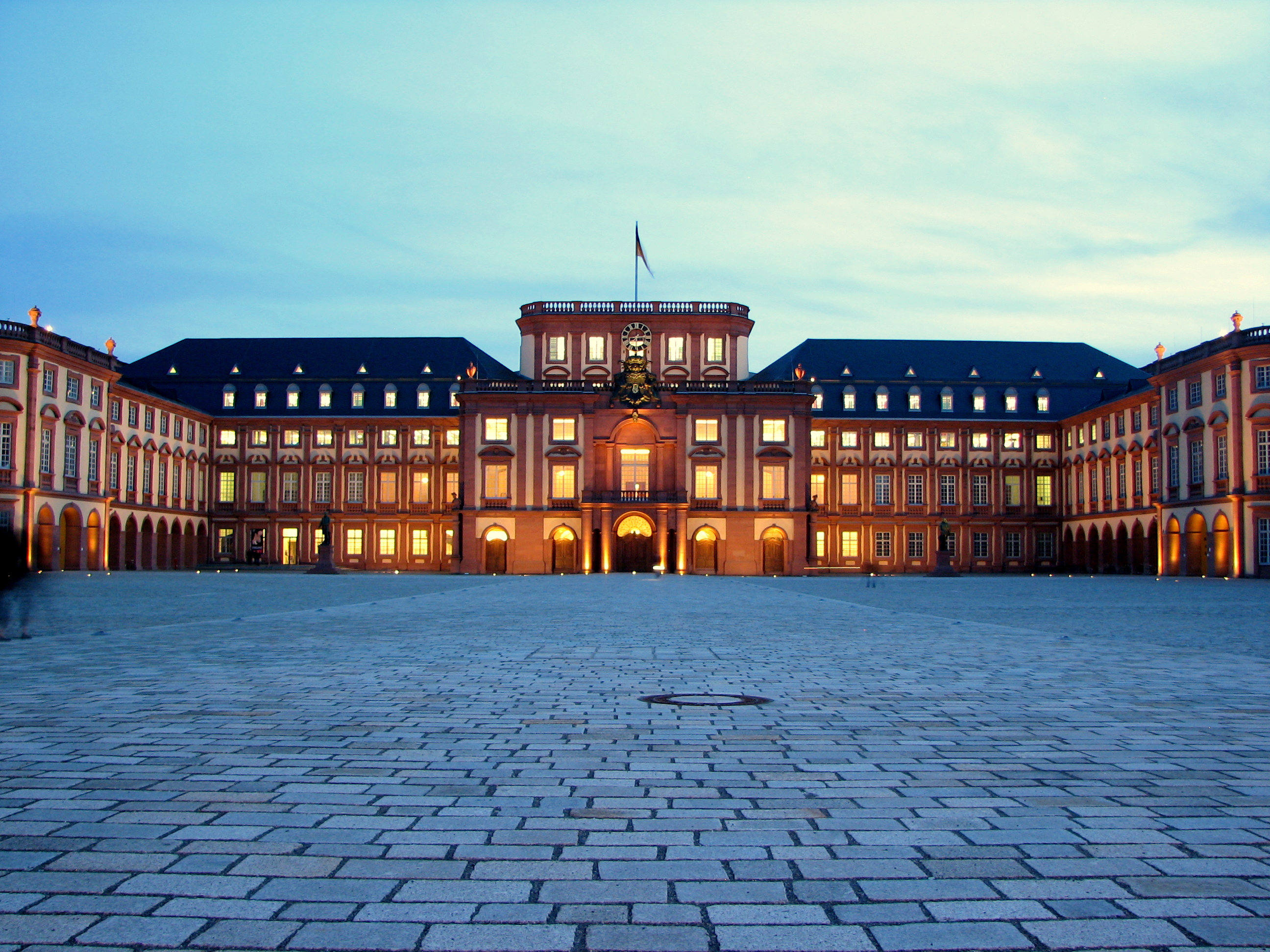 Mannheim Schloss (Castle)